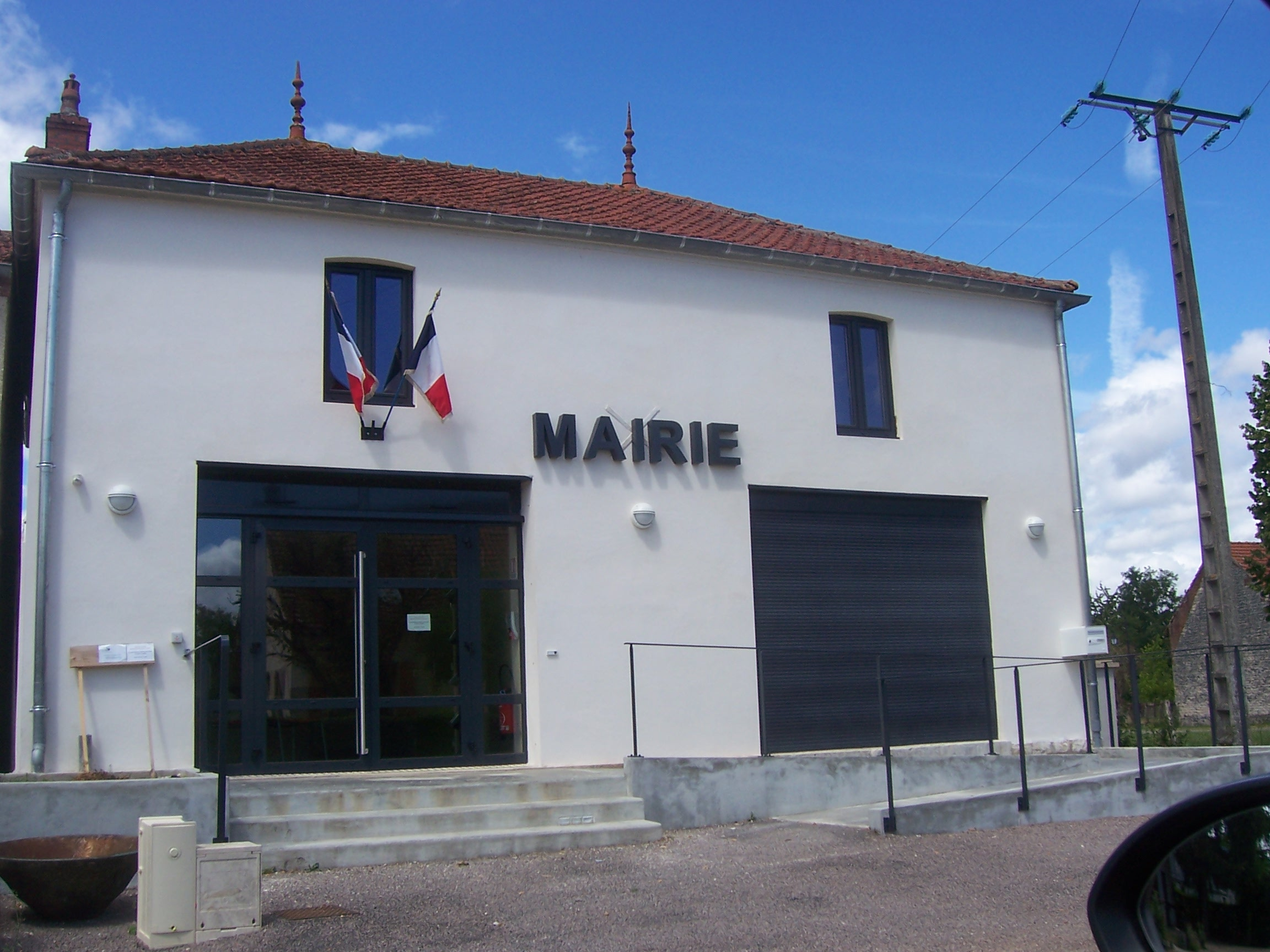 Mairie de Pontoux